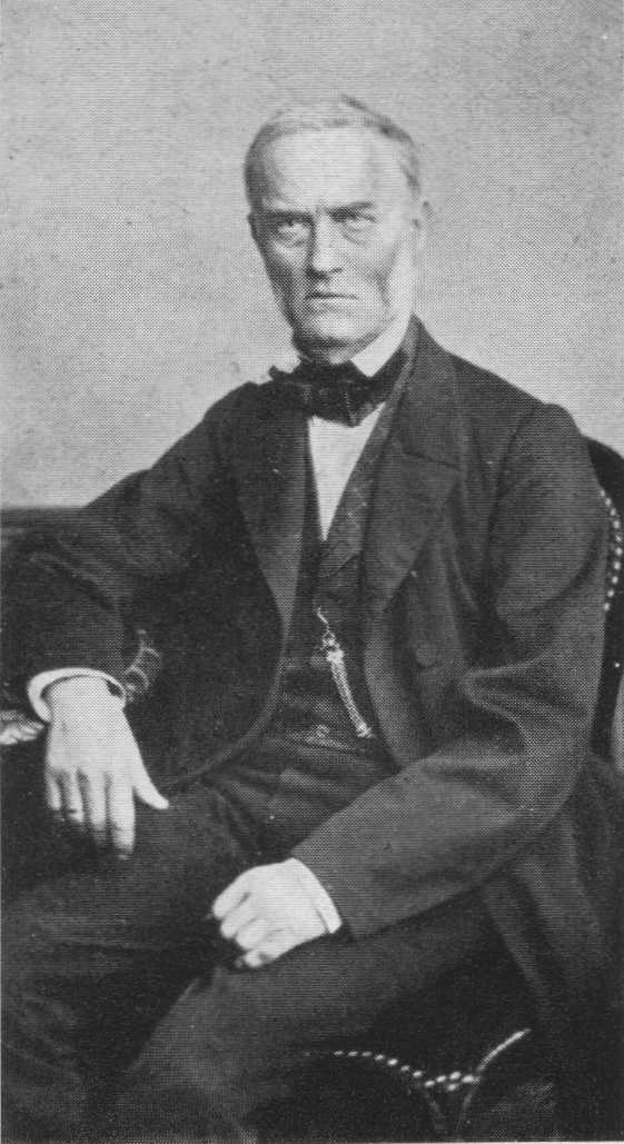 Joseph Gauß als Oberbaurat in der hannoverschen Eisenbahndirektion.